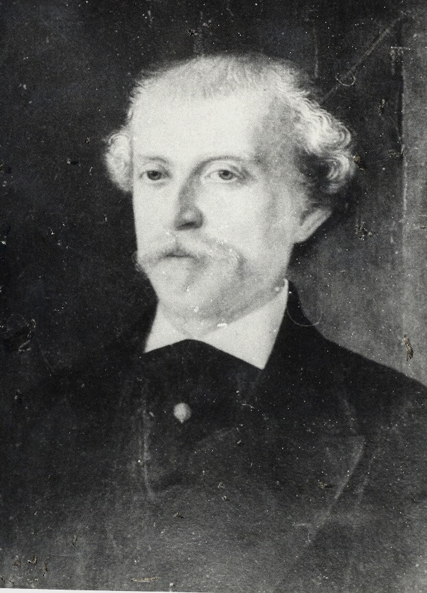 Anton Naum